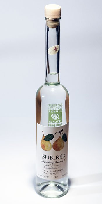 Edelbrand Subirer aus Wolfurt